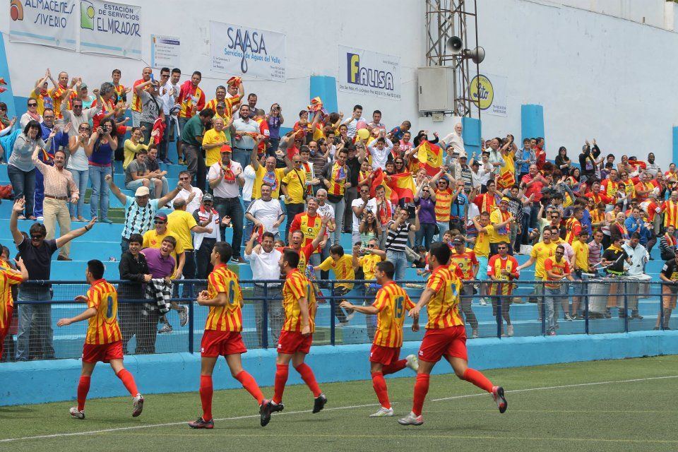 Celebración de uno de los goles que dieron la victoria al Raqui San Isidro por 0-2 ante la UD Realejos en la última jornada de la temporada 2011/12 de Preferente, valiéndole el título y el ascenso a Tercera División.